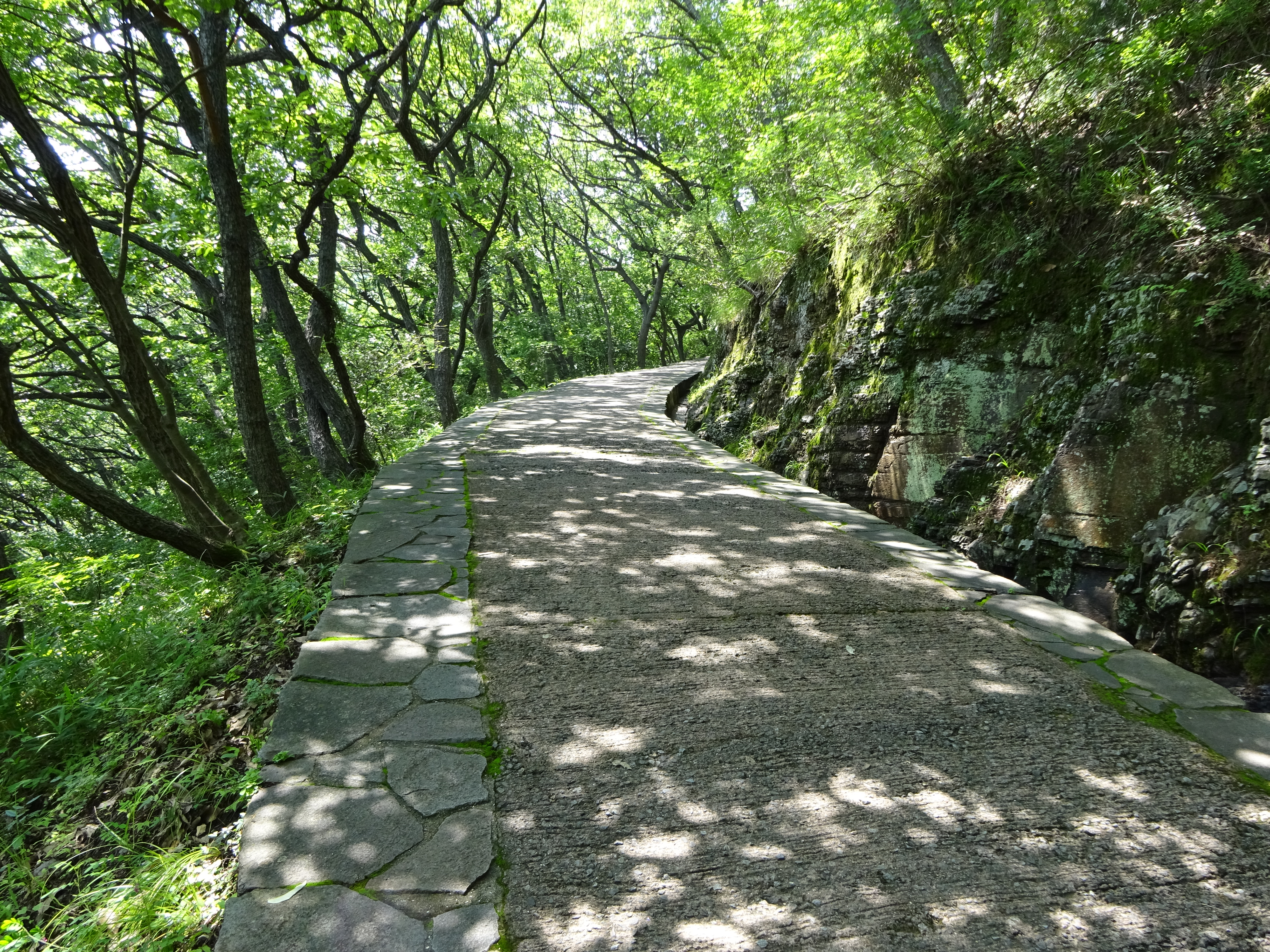 Ｒ１４号の畳石の下流、セメント敷き